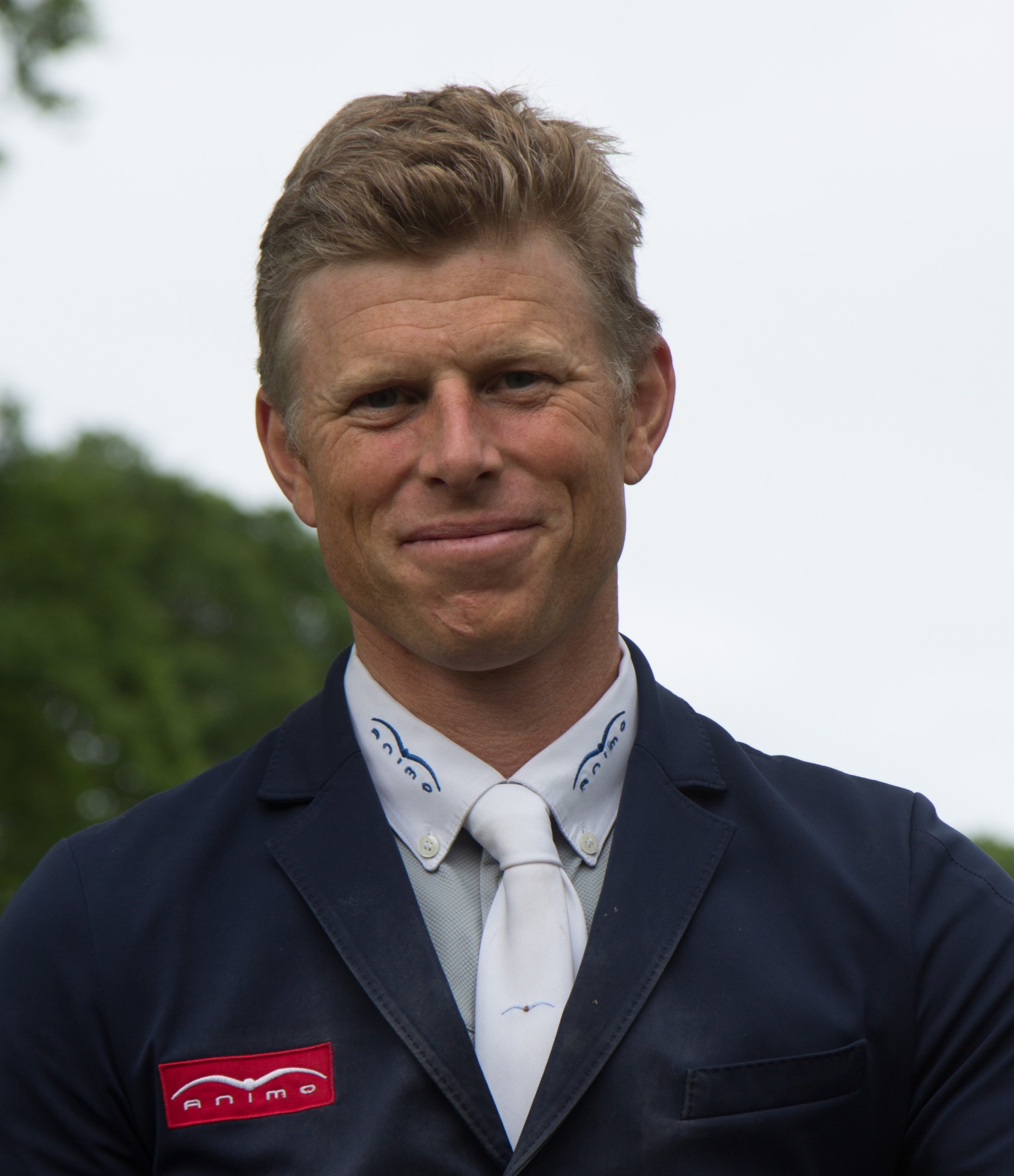 Internationales Wiesbadener Pfingstturnier 2018. CSI 4* Springprüfung KI.S *** m. Stechen (1,50m) "Preis des Hessischen Ministerpräsidenten": Max Kühner auf Alfa Jordan